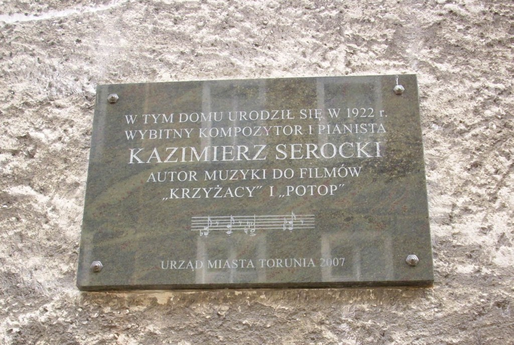 Tablica ku czci Kazimierza Serockiego.